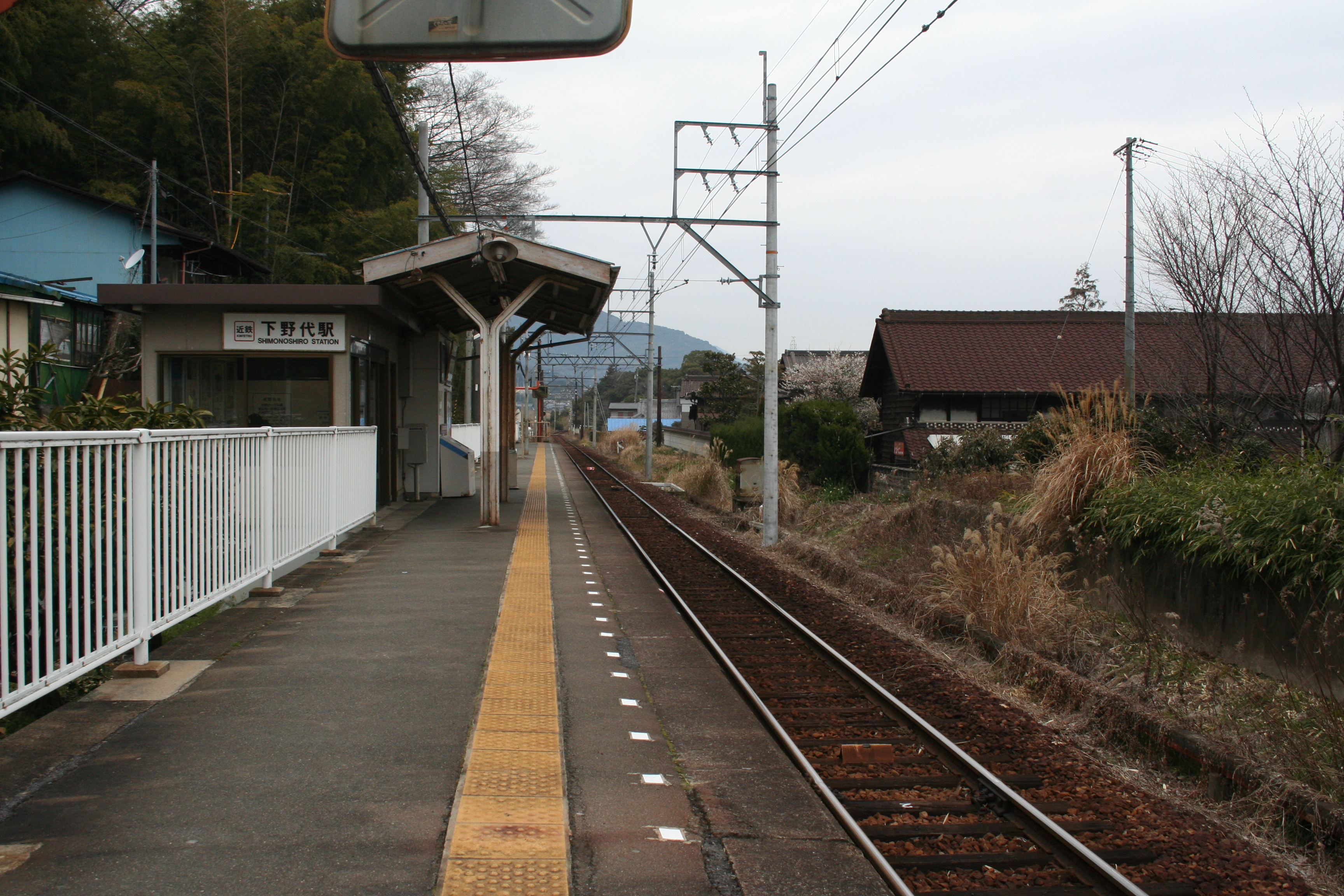 近畿日本鉄道養老線下野代駅